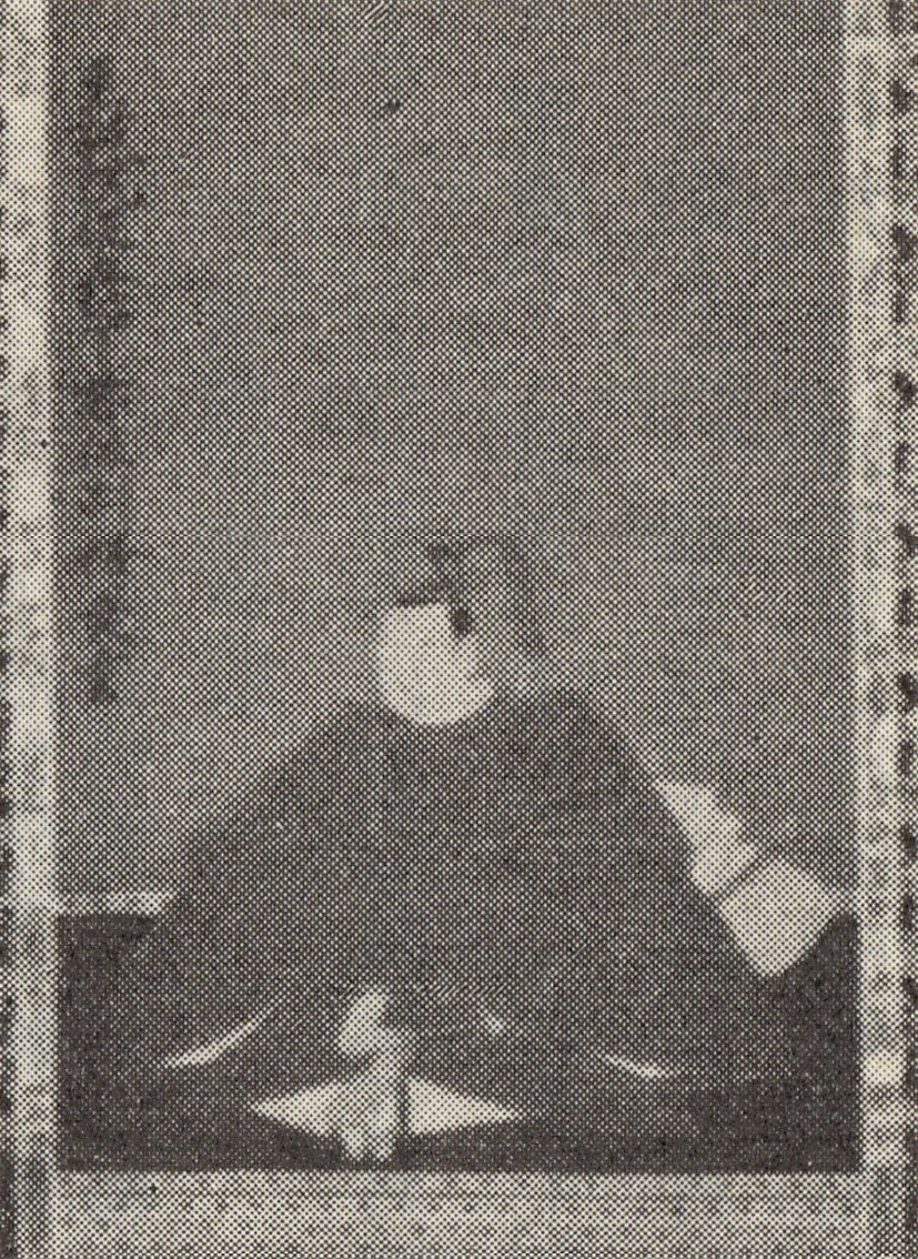 遠藤慶利の肖像(モノクロ)。